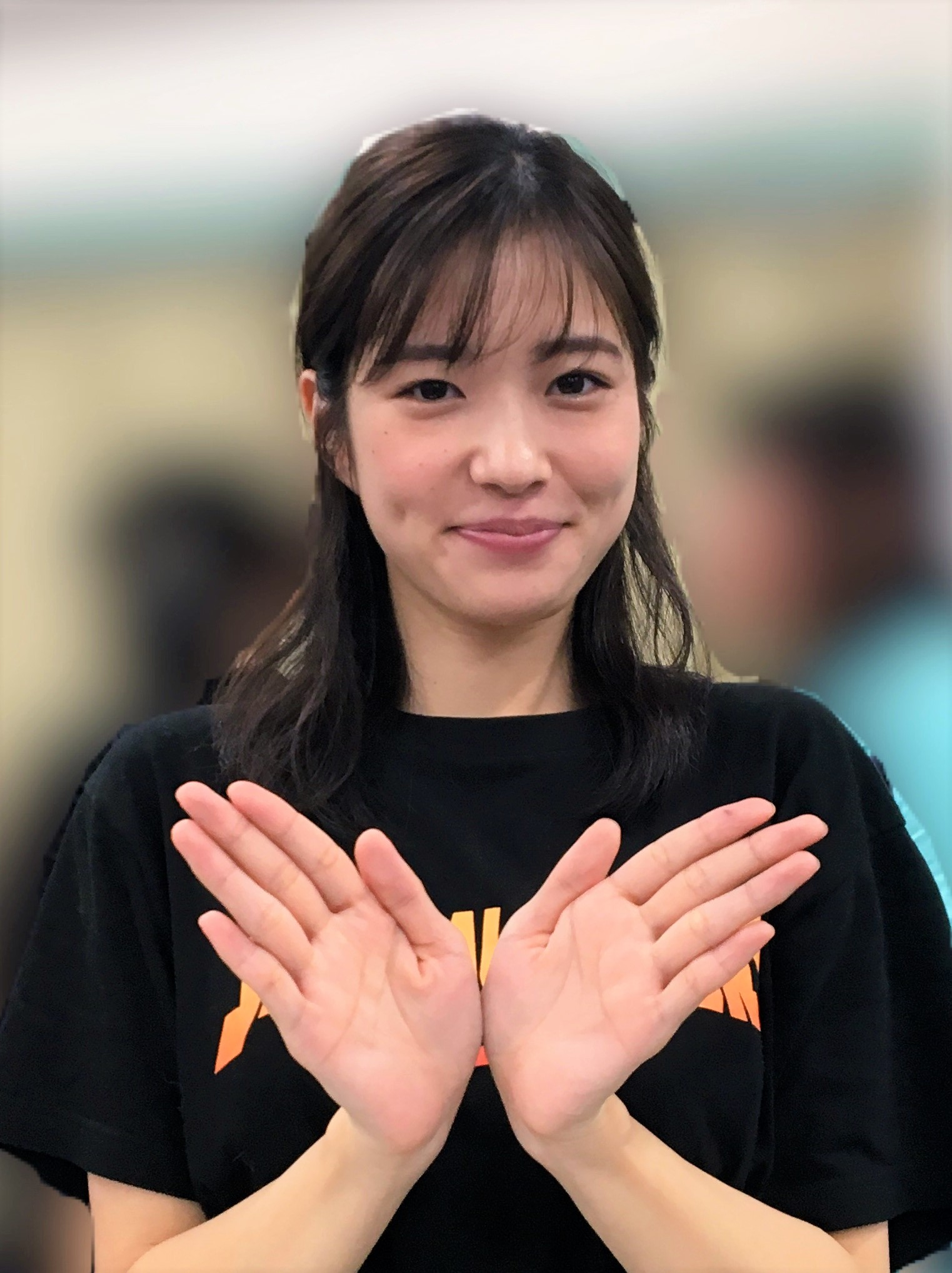 「スペシャルアクターズ ネタバレ全開トークショー」（東京学院ビル3F）に参加した七海役の俳優・櫻井麻七